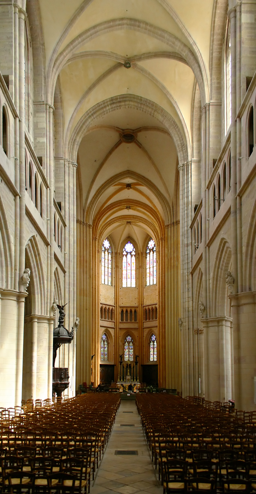 Einblick ins Langhaus (Richtung Chor) der Kathedrale Saint Bénigne, Dijon